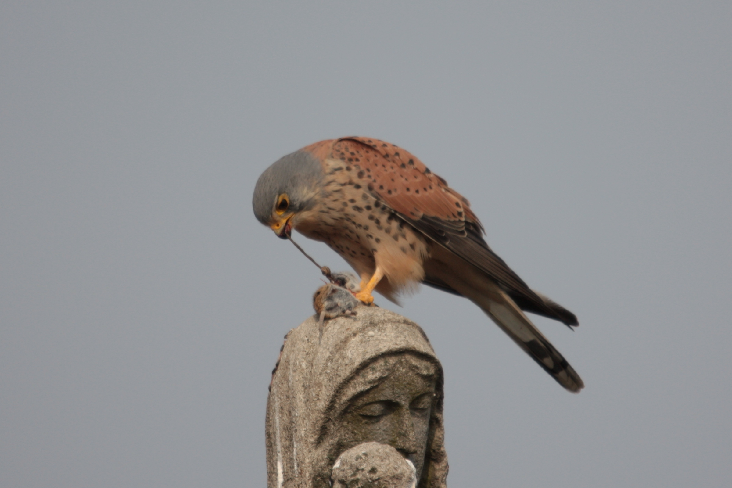 Turmfalke frisst eine Maus; In den Weinbergen in Unterfranken